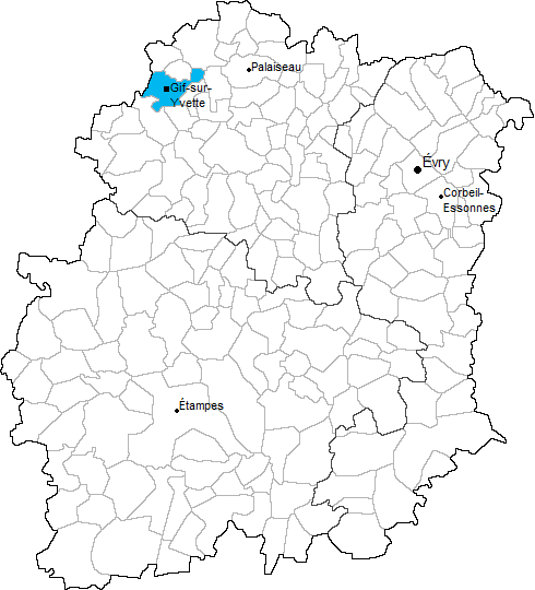 Carte de situation du canton de Gif-sur-Yvette en Essonne (91)